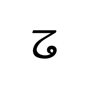 Letra del idioma limbu